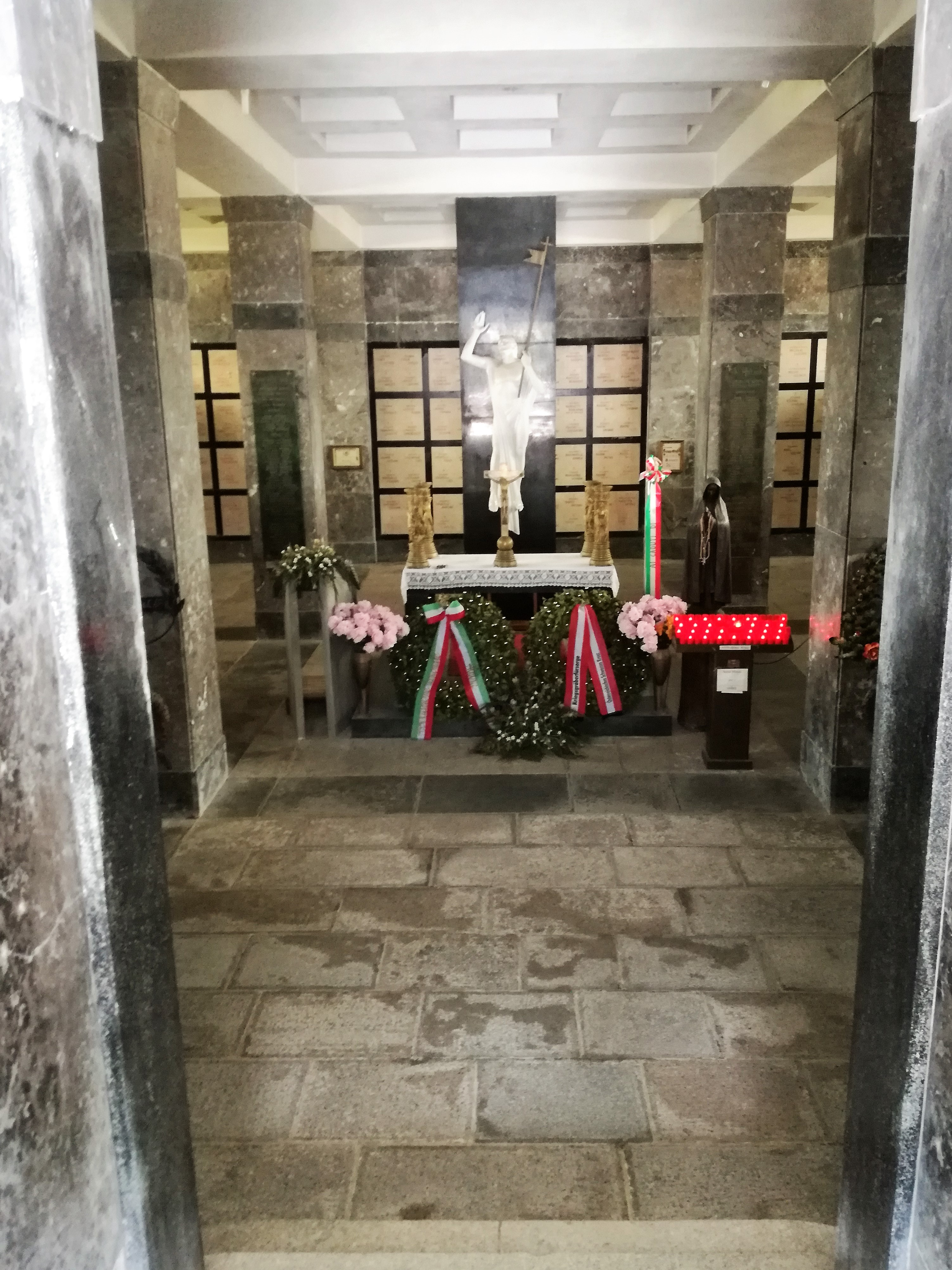 Kriegerdenkmal Tonalepass - Innenraum mit Altar